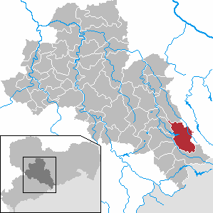 Frauenstein in Saxony - district Mittelsachsen